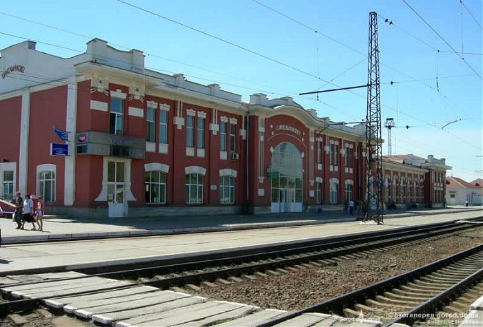 Вокзал станции Синельниково 1